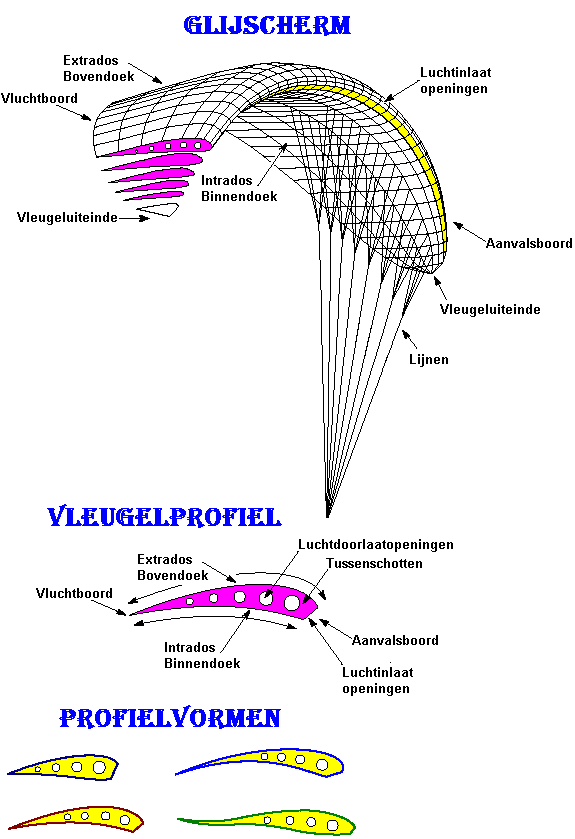 Eigen figuur